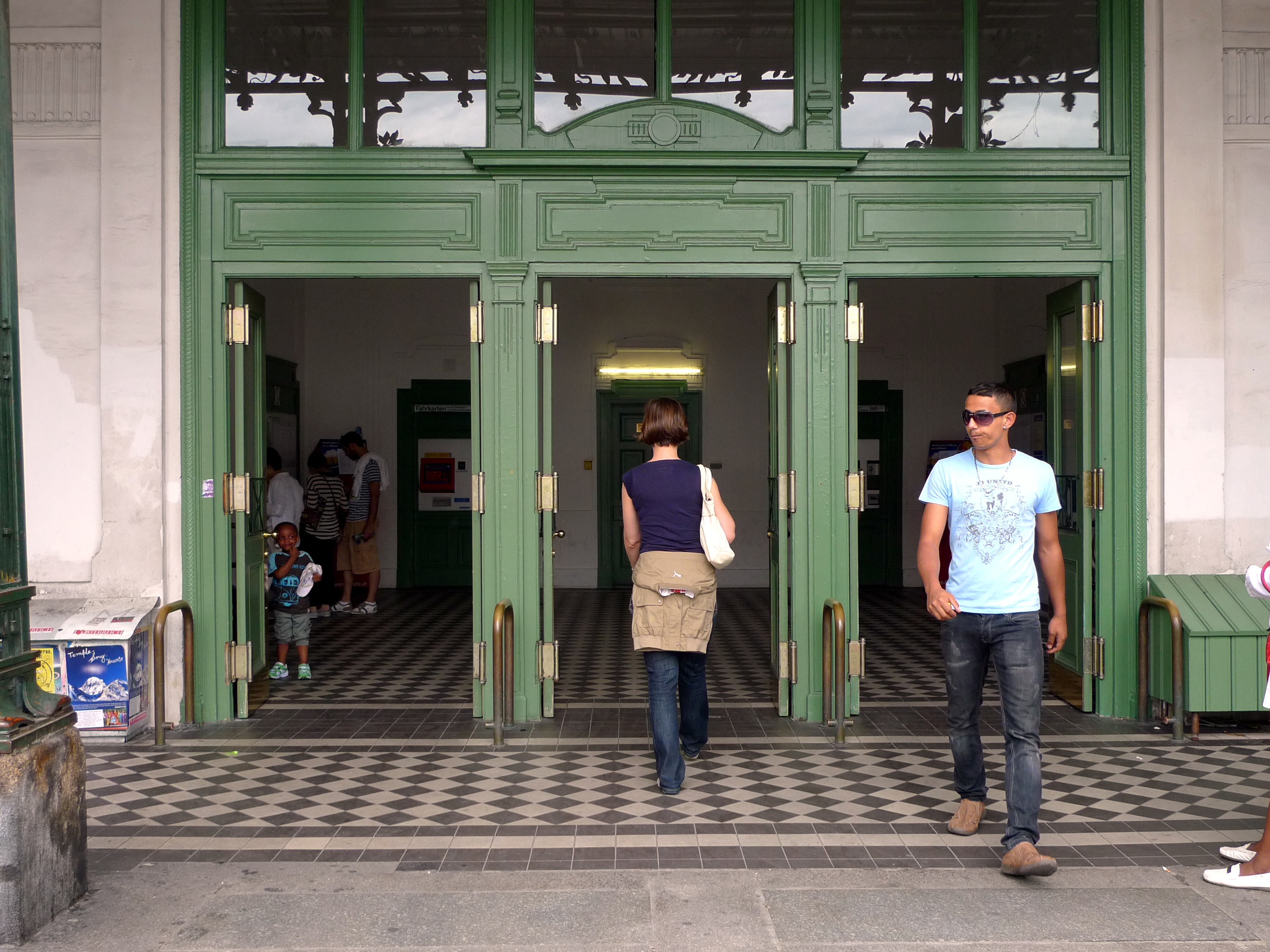 L1080861